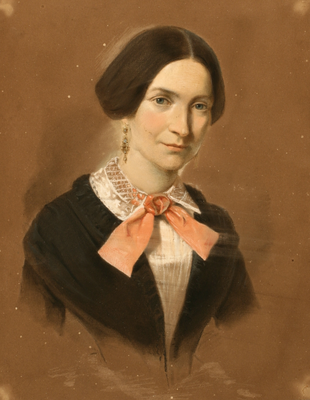 Ludmilla Assing, Selbstbildnis 27x21 cm, Pastell um 1850.